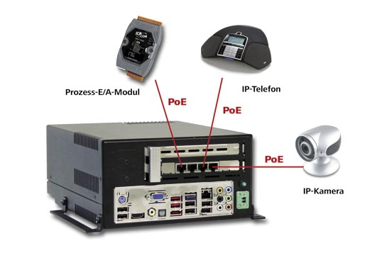 Spectra PowerBox 1260 PoE